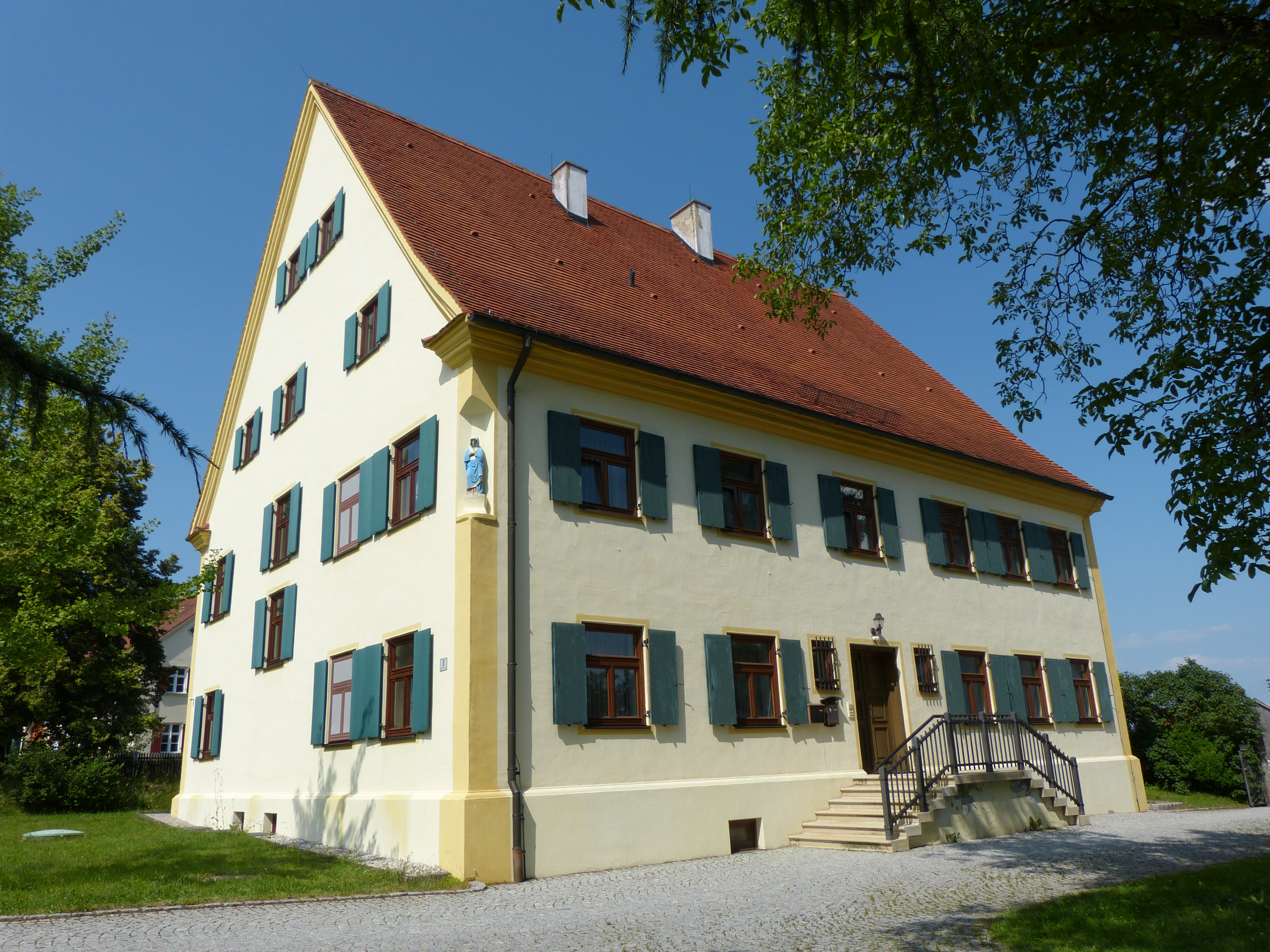 Pfarrhaus, Markt Wald, Landkreis Unterallgäu, Bayern, Deutschland